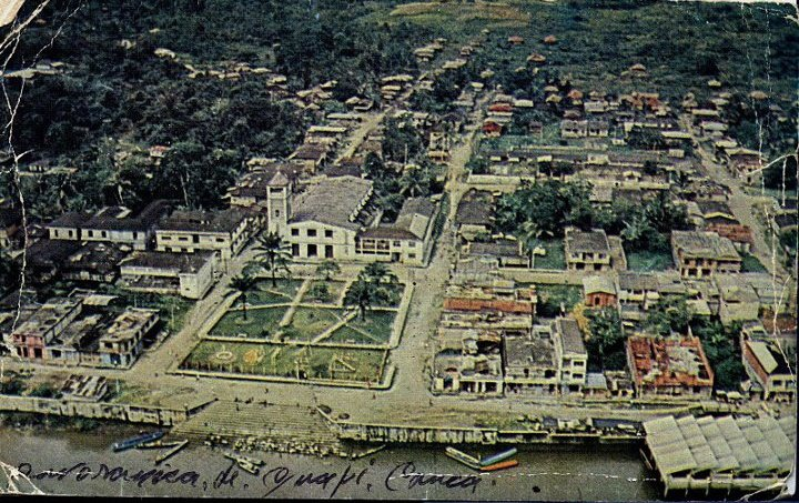 Guapi Cauca